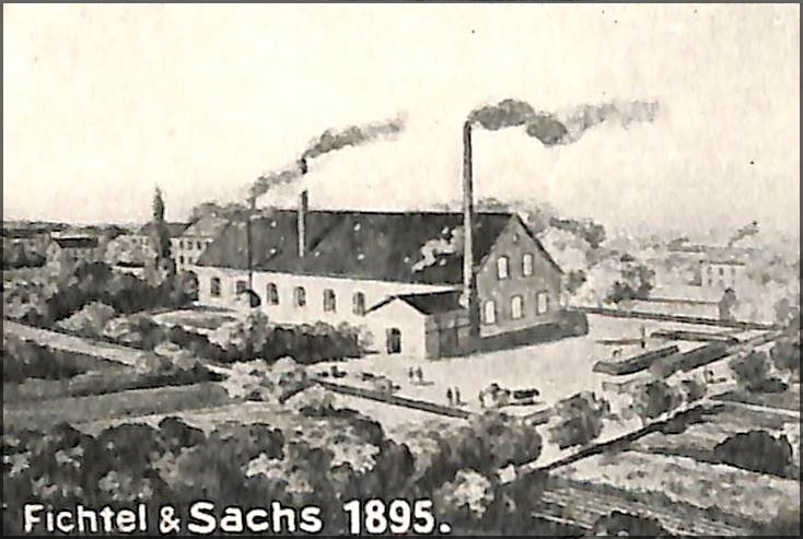 Schweinfurt - Ansicht des ersten Firmengebäudes - damals im Besitz der Mutter von Karl Fichtel, hier wurde 1895 die Produktion mit der Herstellung der Fahrradnabe nach Reichspatent 84193 begonnen.